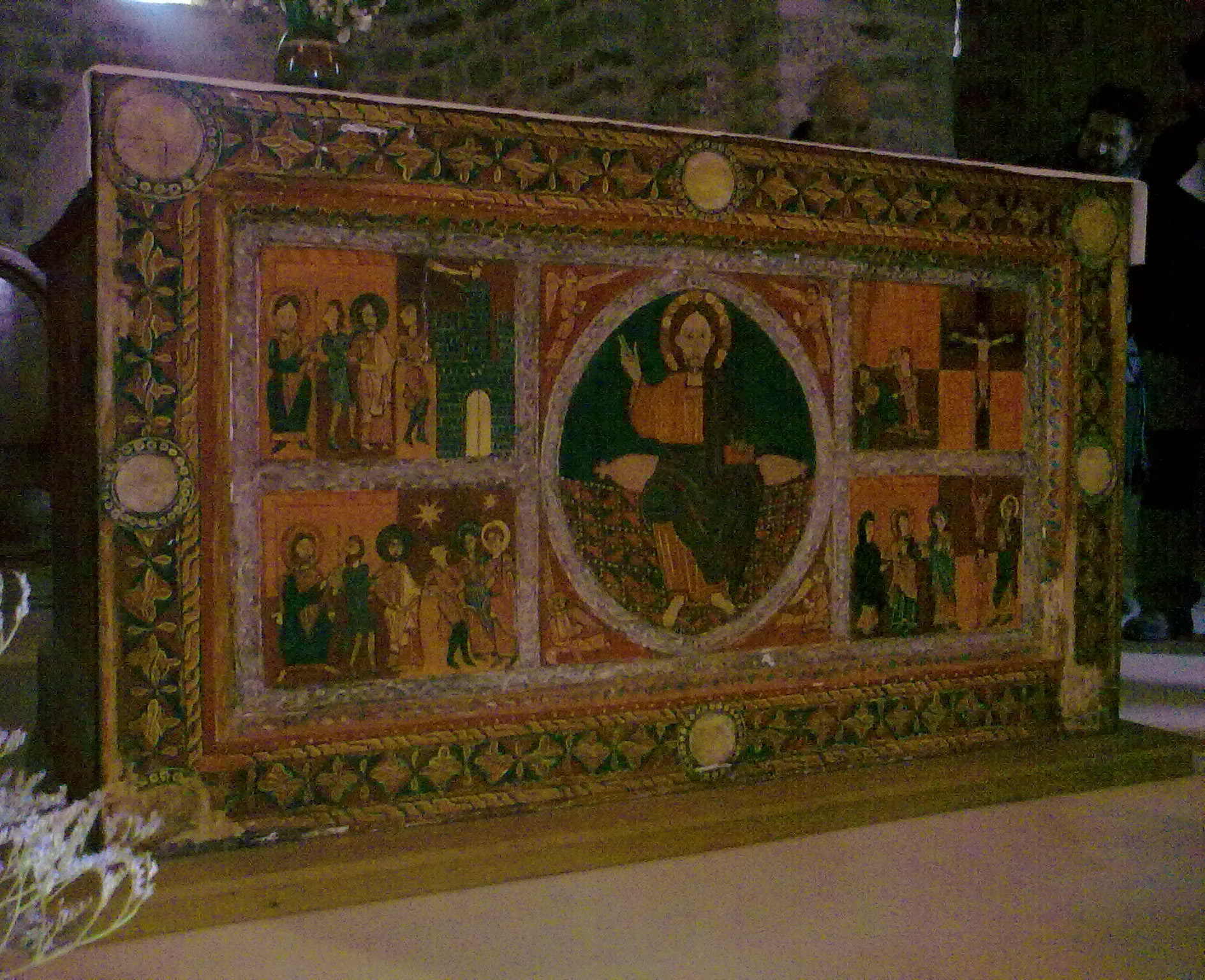 Frontal d'altar de l'església romànic de Sant Andreu de Sagàs. Comarca del Berguedà.